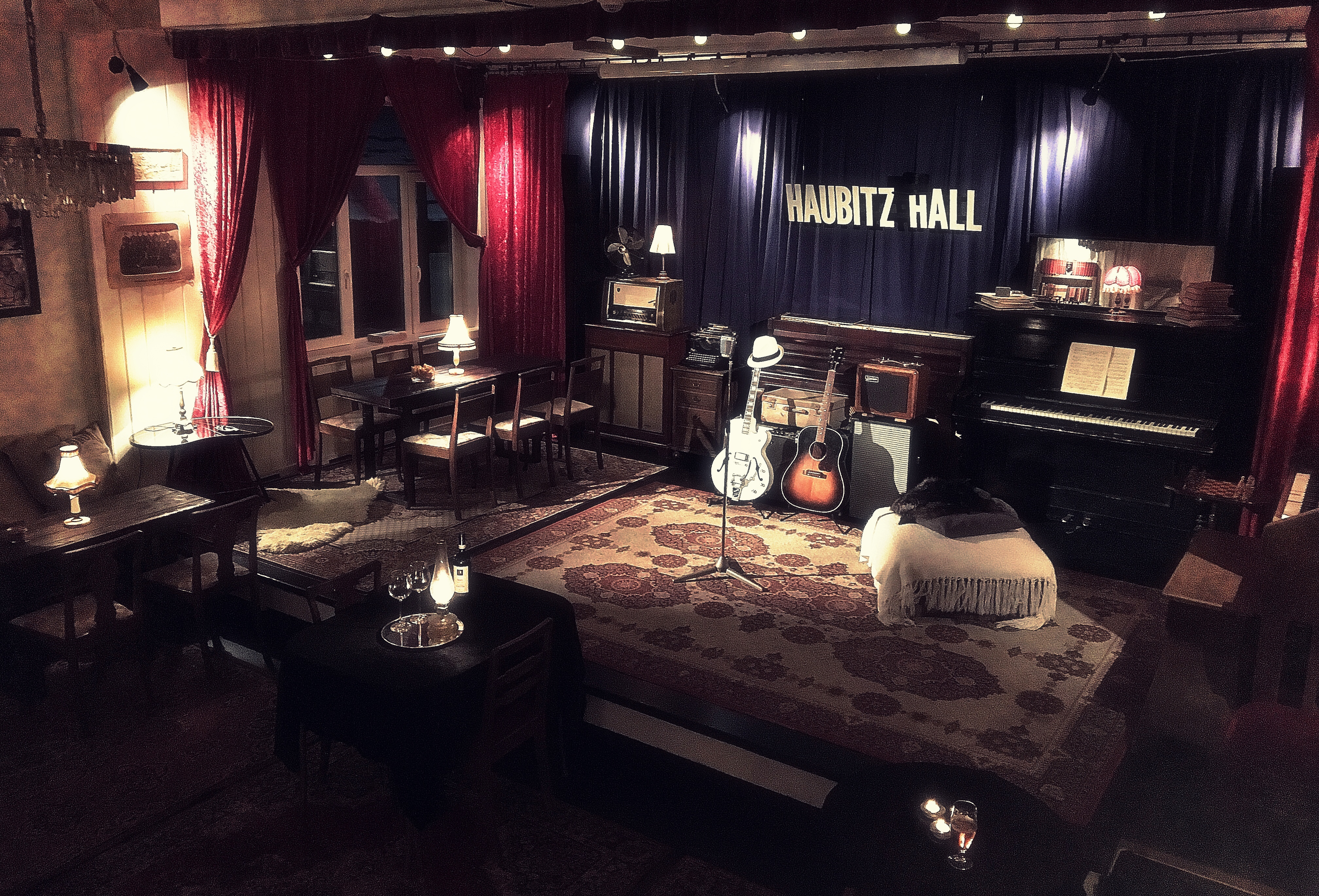 Haubitz Hall Salongen